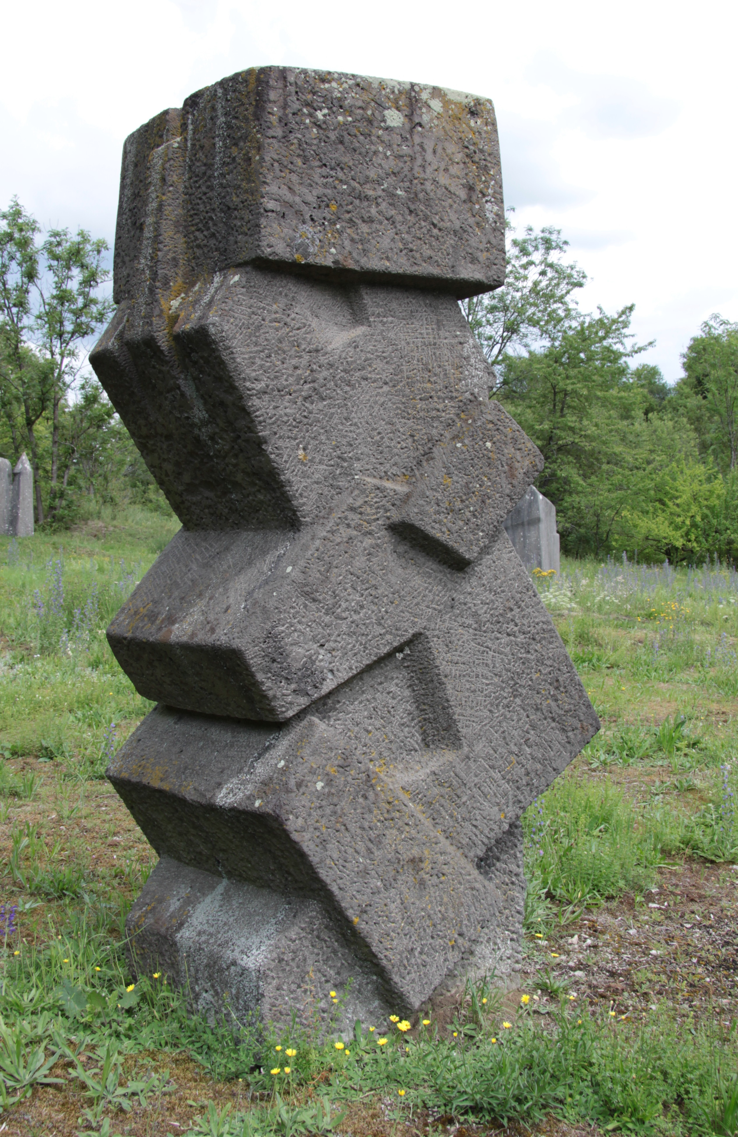 Jakob Savinsek (1961). 1. Internationales Bildhauersymposion in der BRD in Gaubüttelbronn